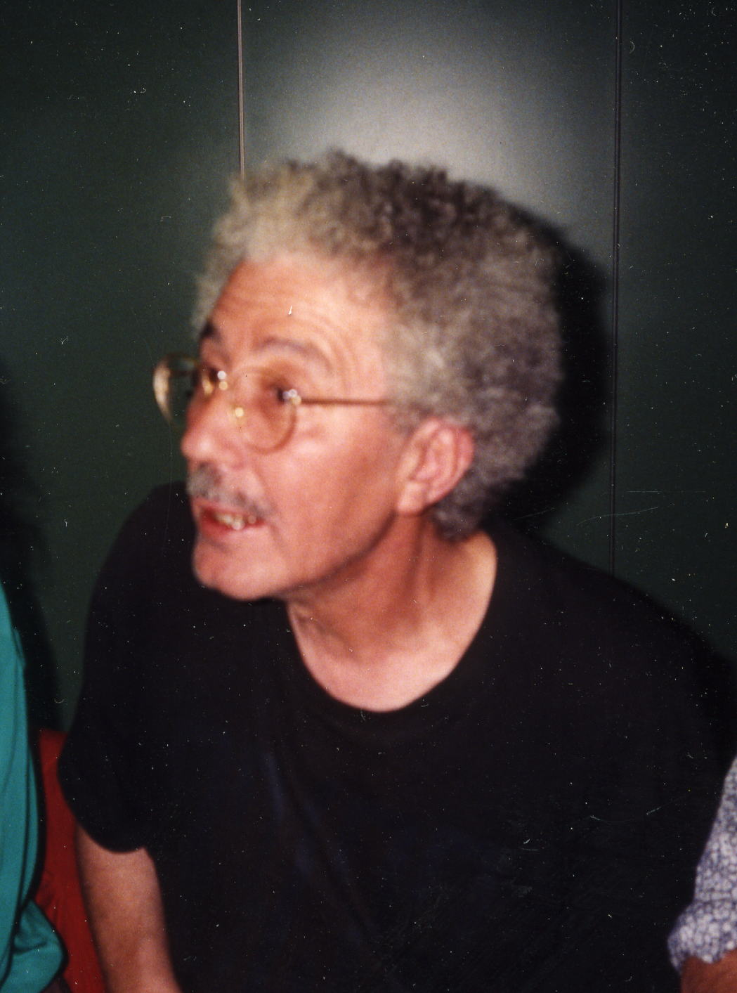 L'écrivain algérien Malek Alloula